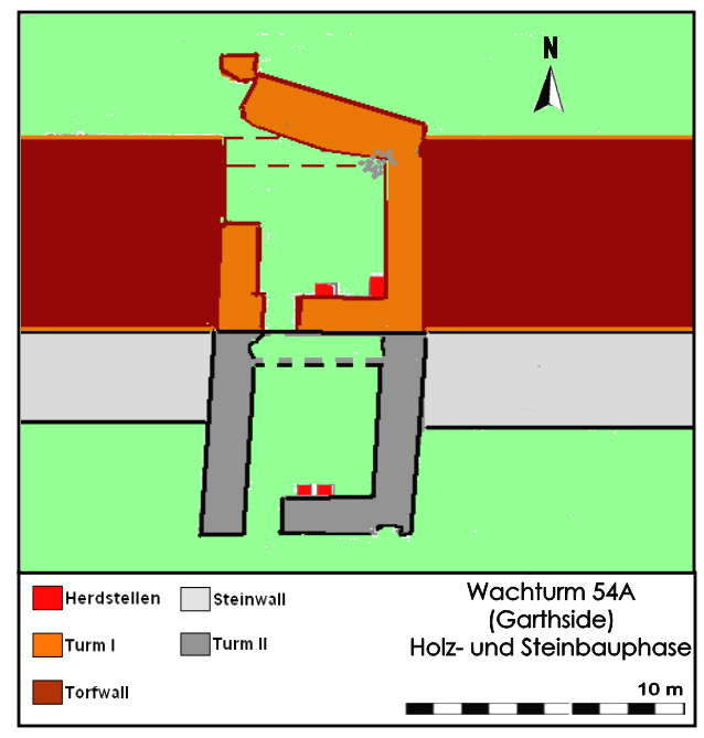 Befundskizze Wachturm 54A (I und II) Garthside, Hadrianswall, 2. - 3. Jahrhundert n.Chr.